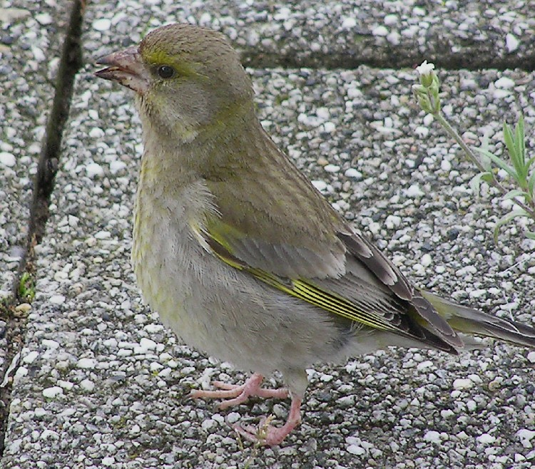 Grünling auf der Terrasse